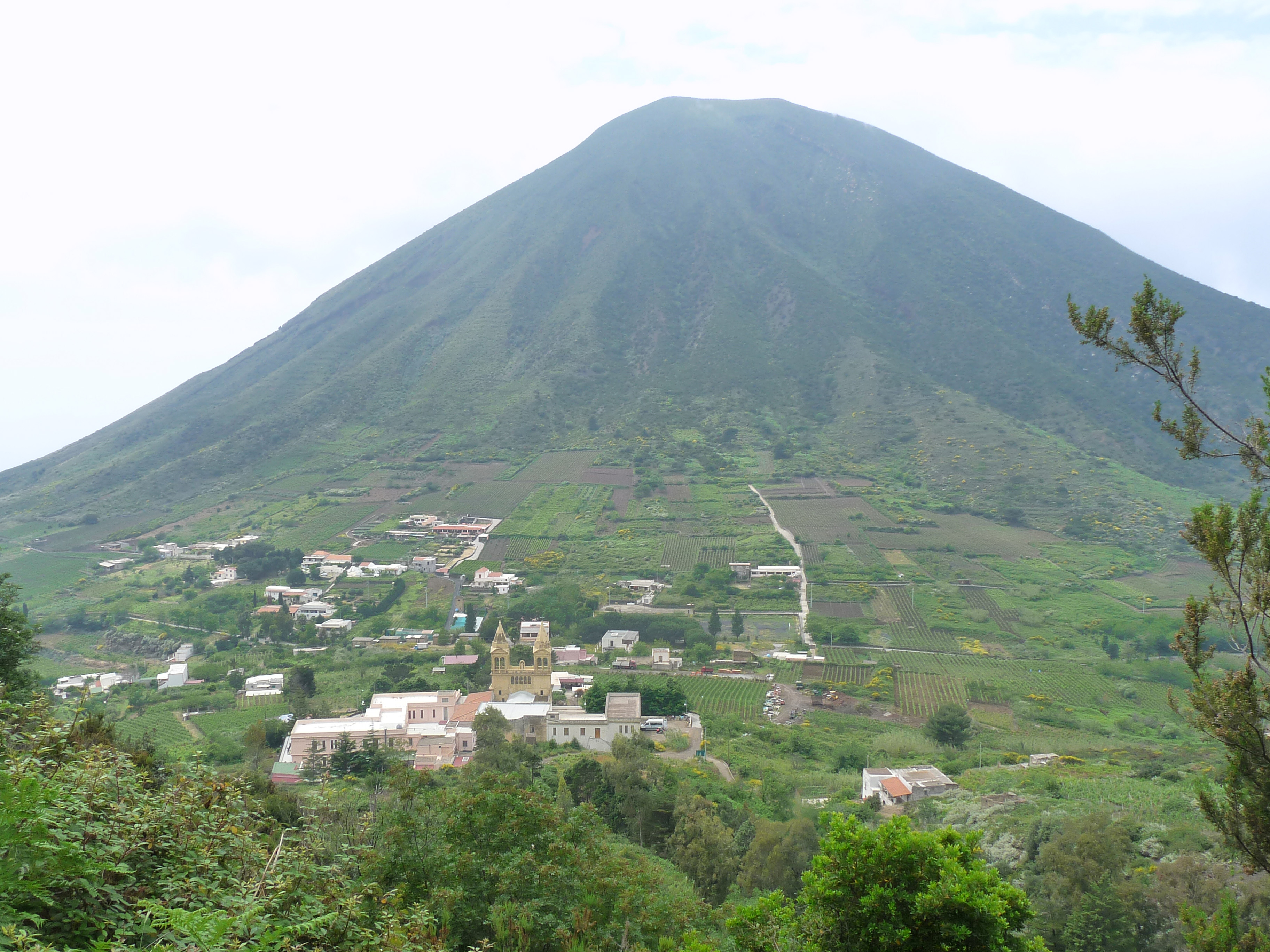 Monte dei Porri. Volcan éteint à l'ouest de l'île de Salina (îles Eoliennes, Sicile). Altitude : 860 m.